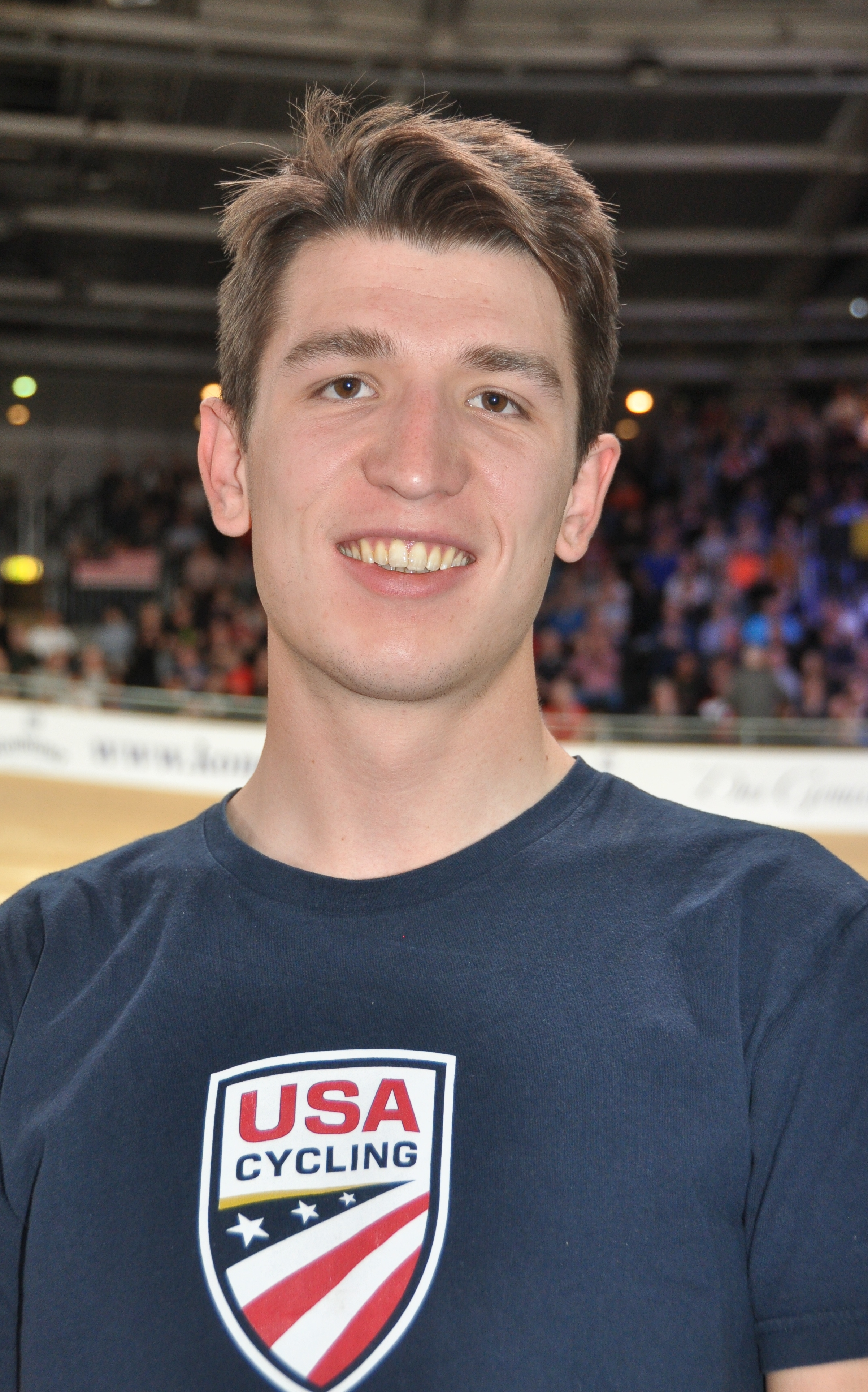 Gavin Hoover, US-amerikanischer Radsportler